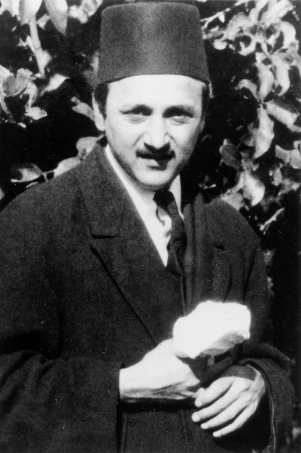 Շողի Էֆֆենդի